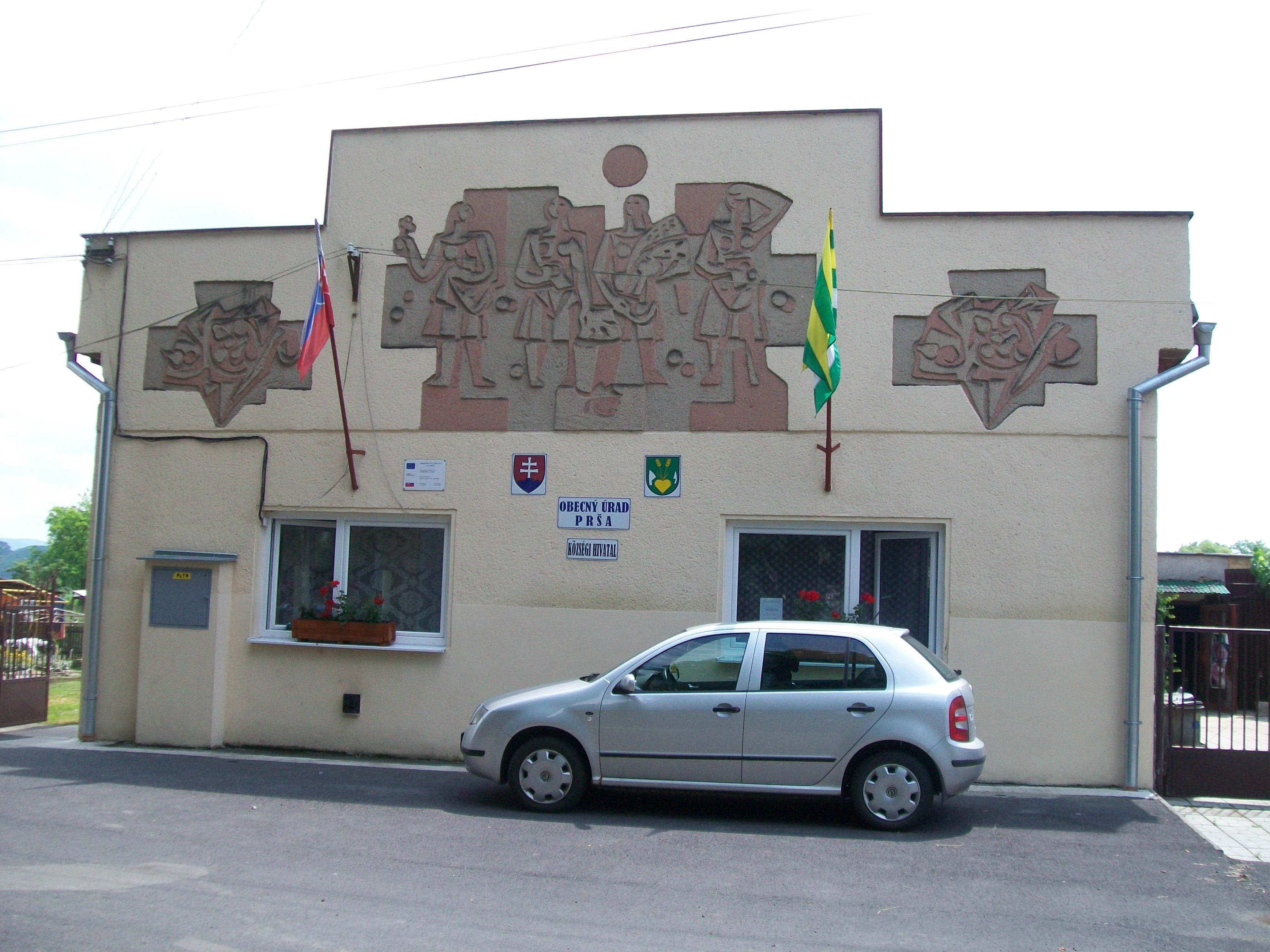 Obecný úrad v obci Prša